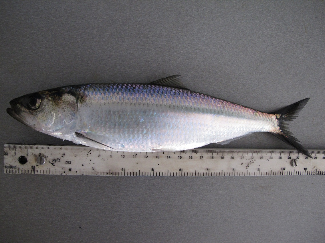 Оселедець керченський (Alosa maeotica), острів Зміїний